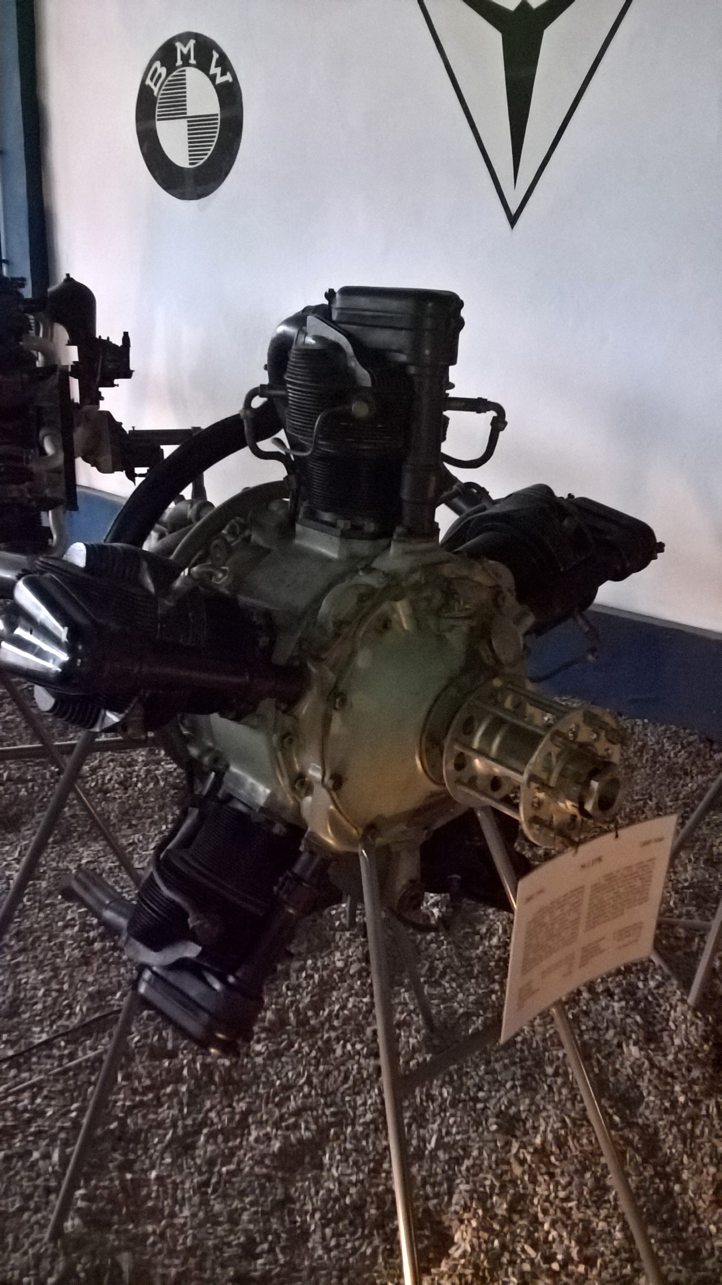 Radziecki 5-cylindrowy silnik gwiazdowy M-11FR z 1955 r. ze zbiorów Muzeum Lotnictwa Polskiego w Krakowie.